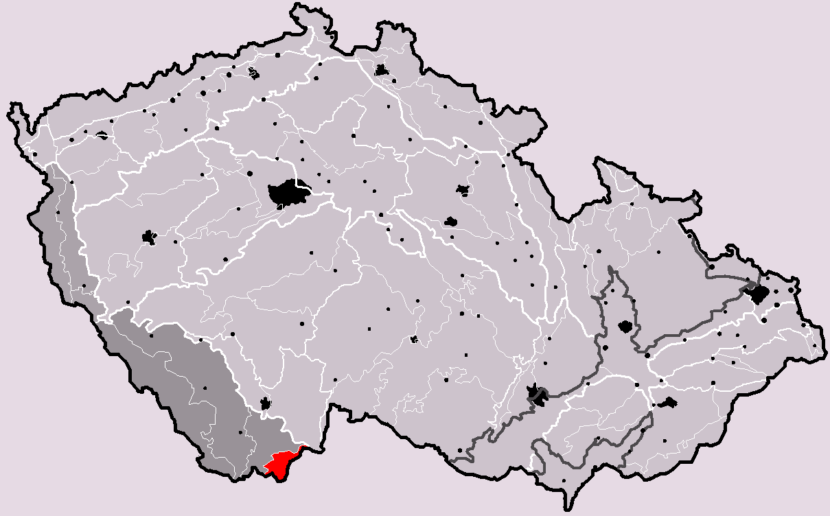 Poloha geomorfologického celku Novohradské hory v rámci České republiky. Hercynský systém Hercynská pohoří I Česká vysočina I1 (I) Šumavská subprovincie I1B (IB) Šumavská hornatina I1B-3 (IB-3) Novohradské hory